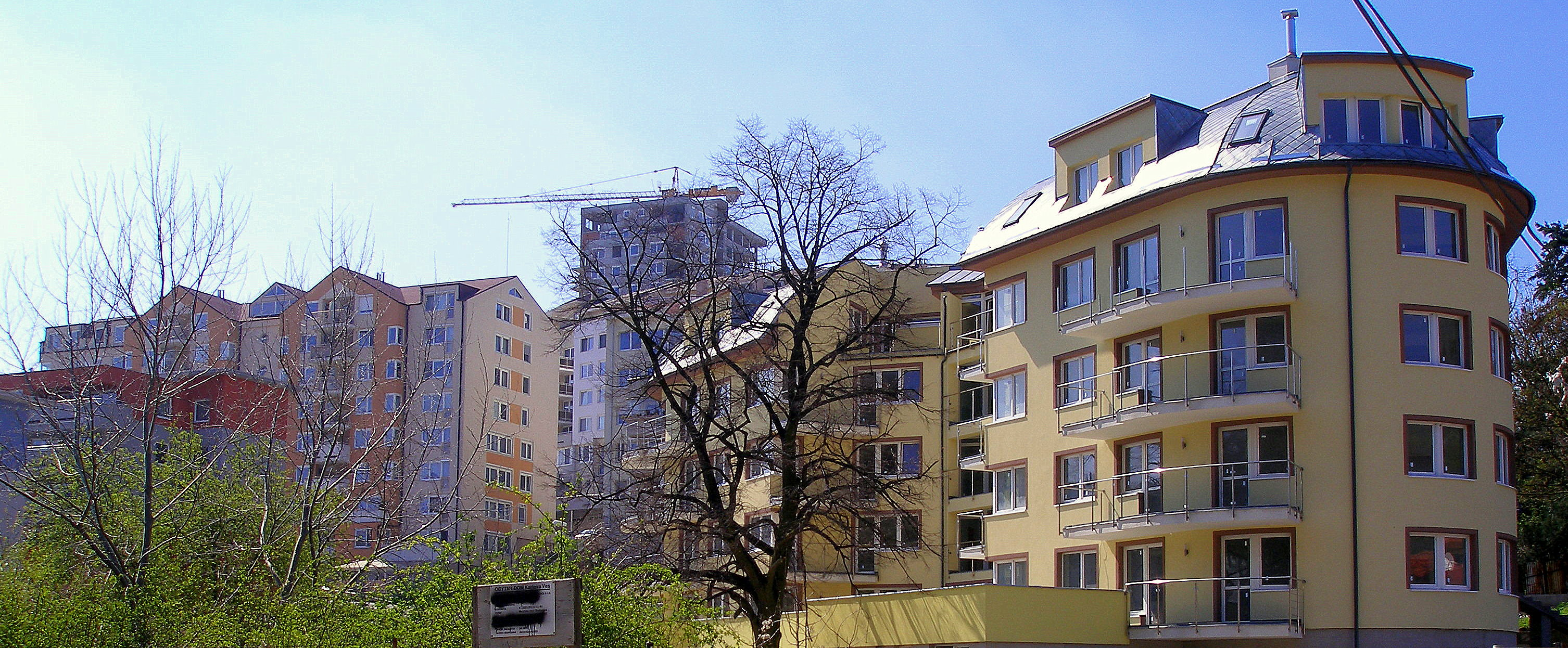 Líščie údolie v Bratislave.